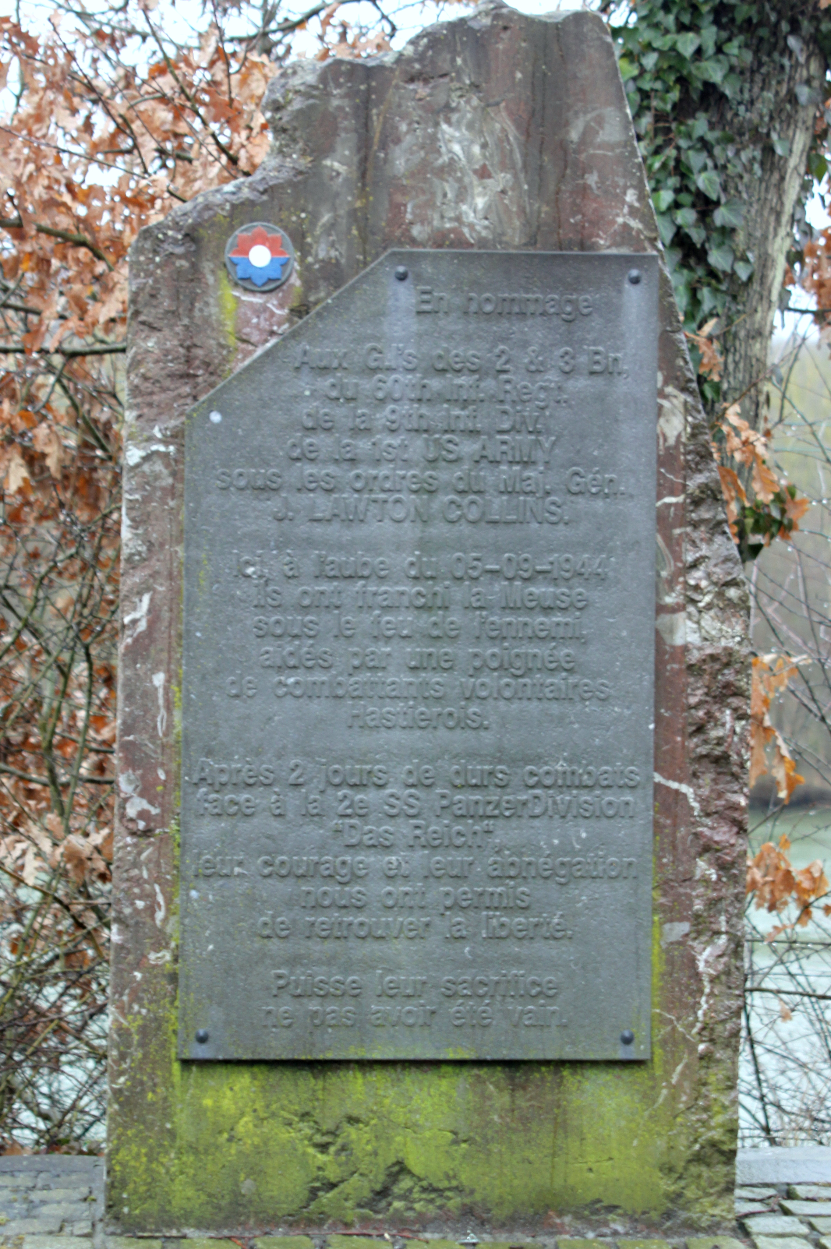 US-Monument zu Hermeton-sur-Meuse